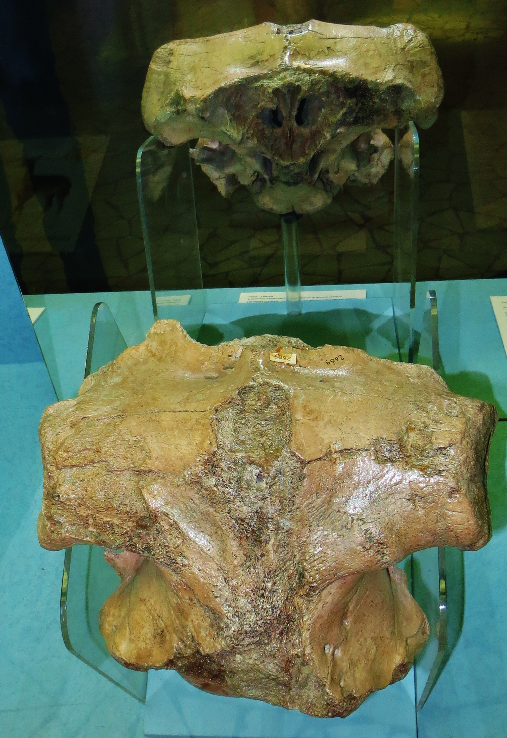 Fossil of Cervalces, an extinct mammal - Took the picture at Museo di Scienze Naturali di Bergamo